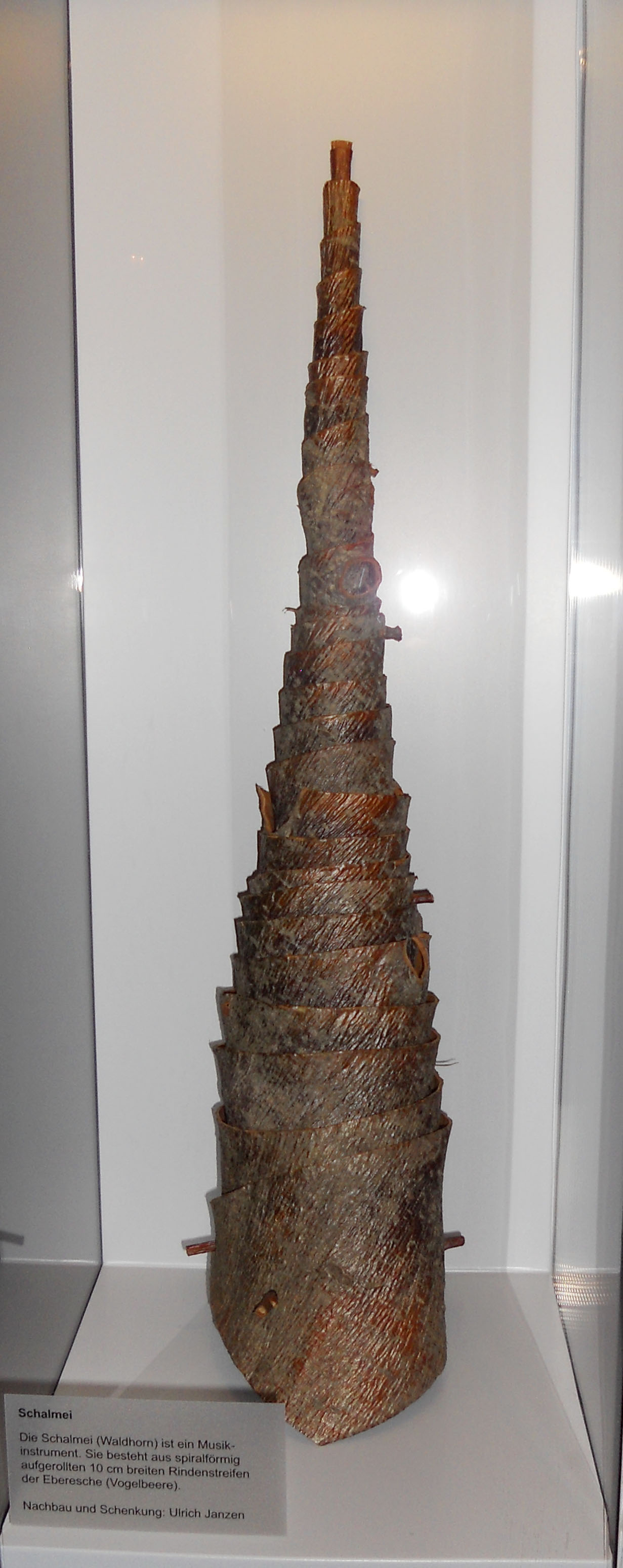 aus getrockneter Rinde gedrehte Schalmei im Haus Hövener